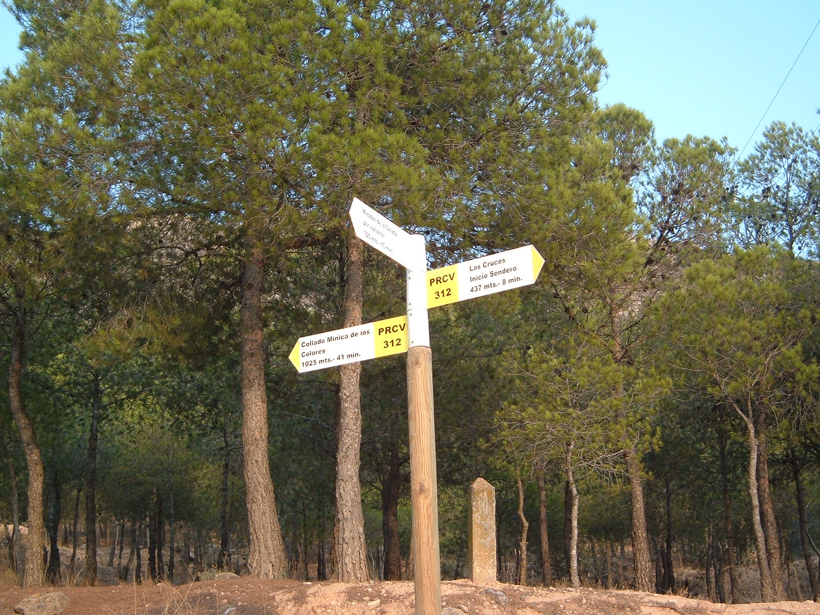 Poste indicando la dirección de diversos senderos, en la Sierra de la Villa de Villena